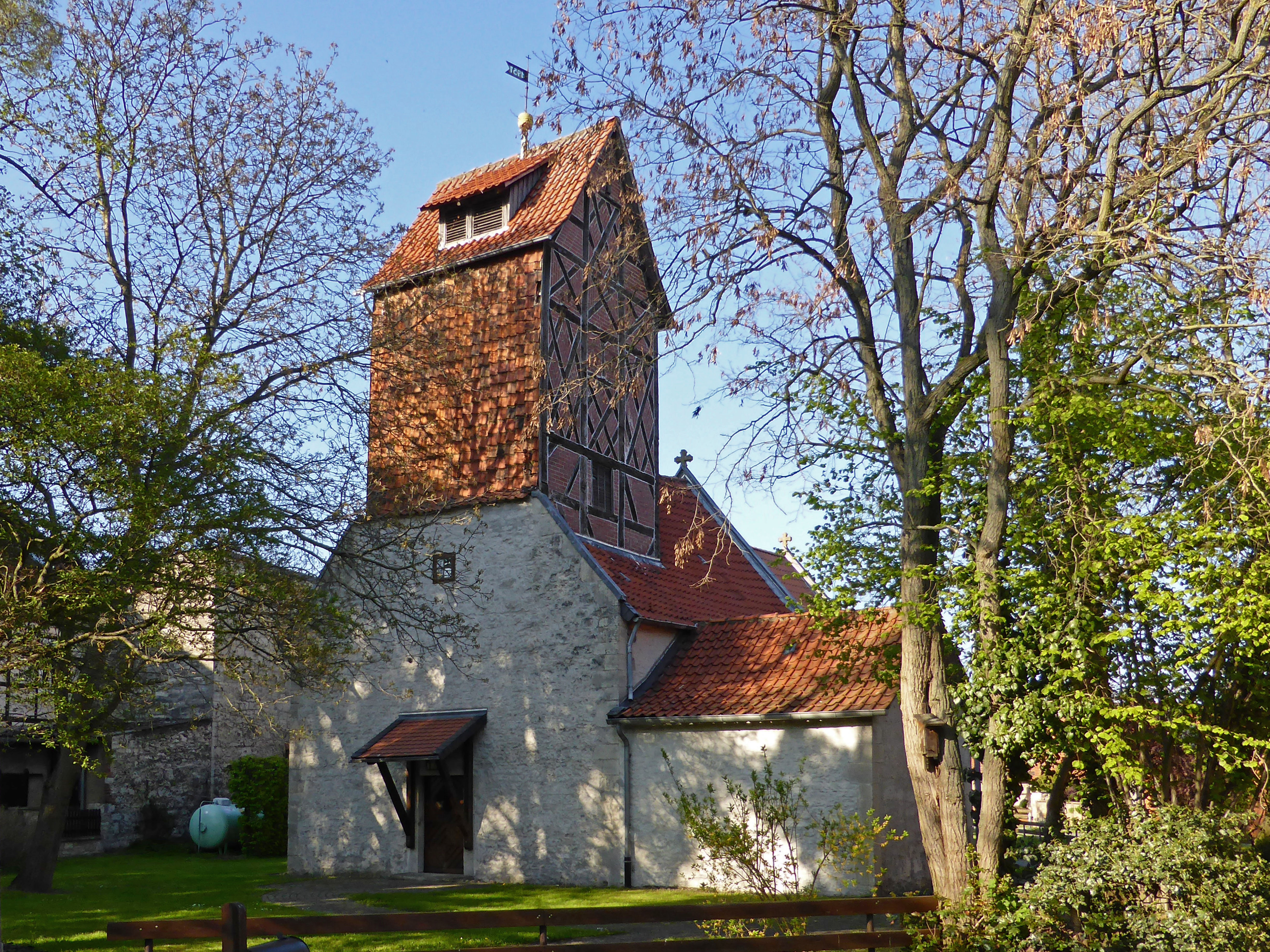 Kirchen in Scheppau.